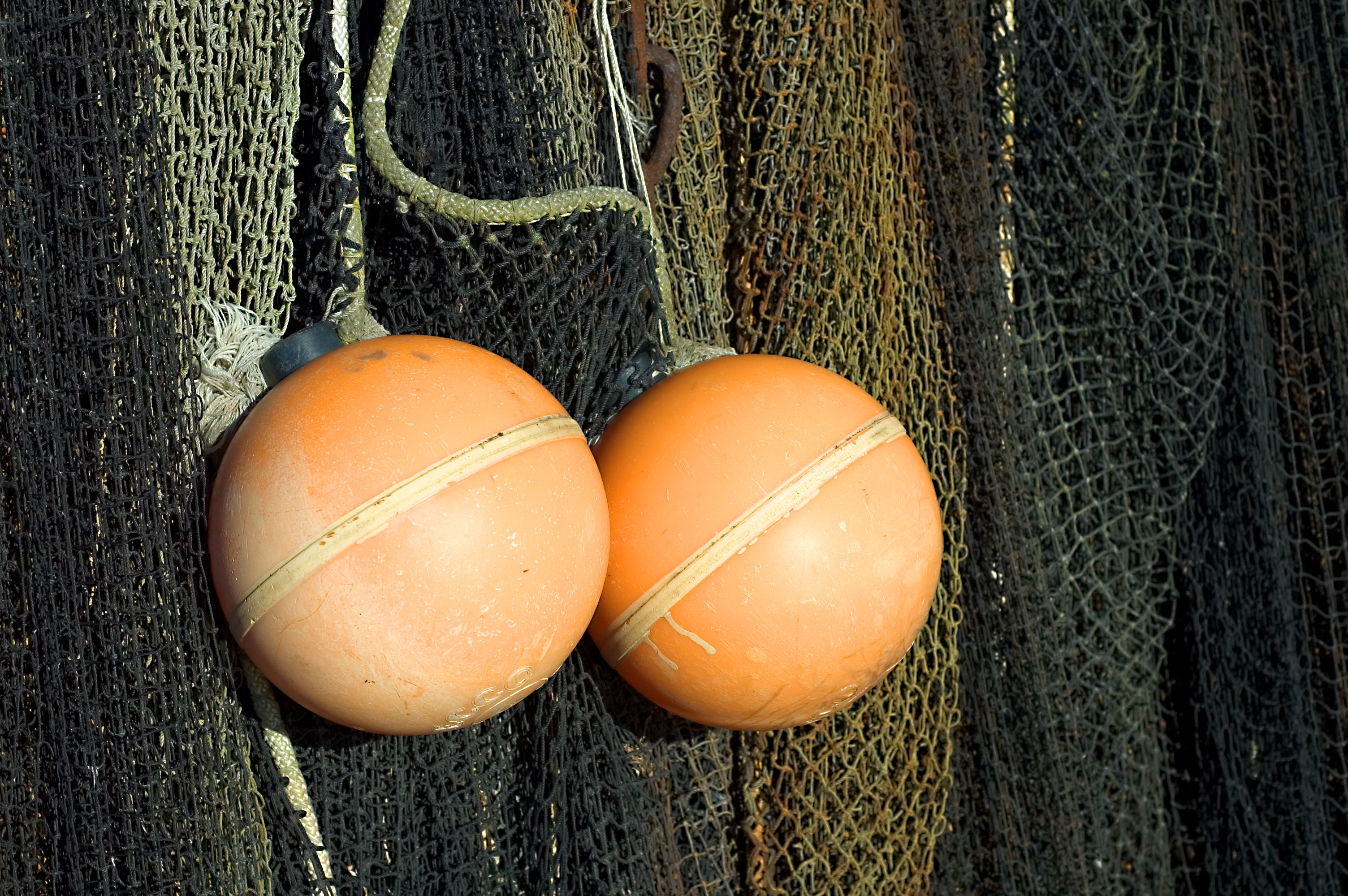 D